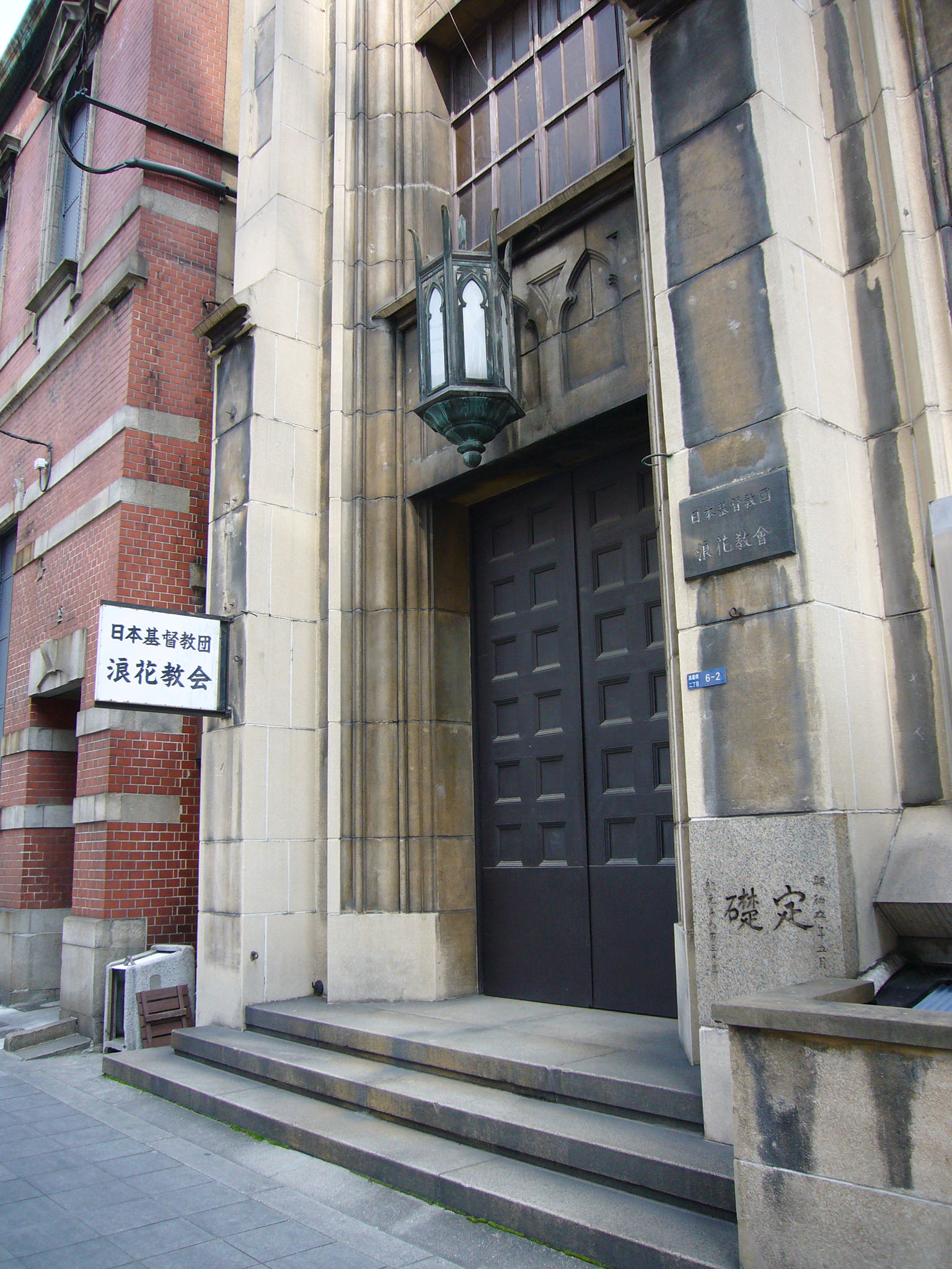 UCCJ Naniwa Church in Osaka, Japan